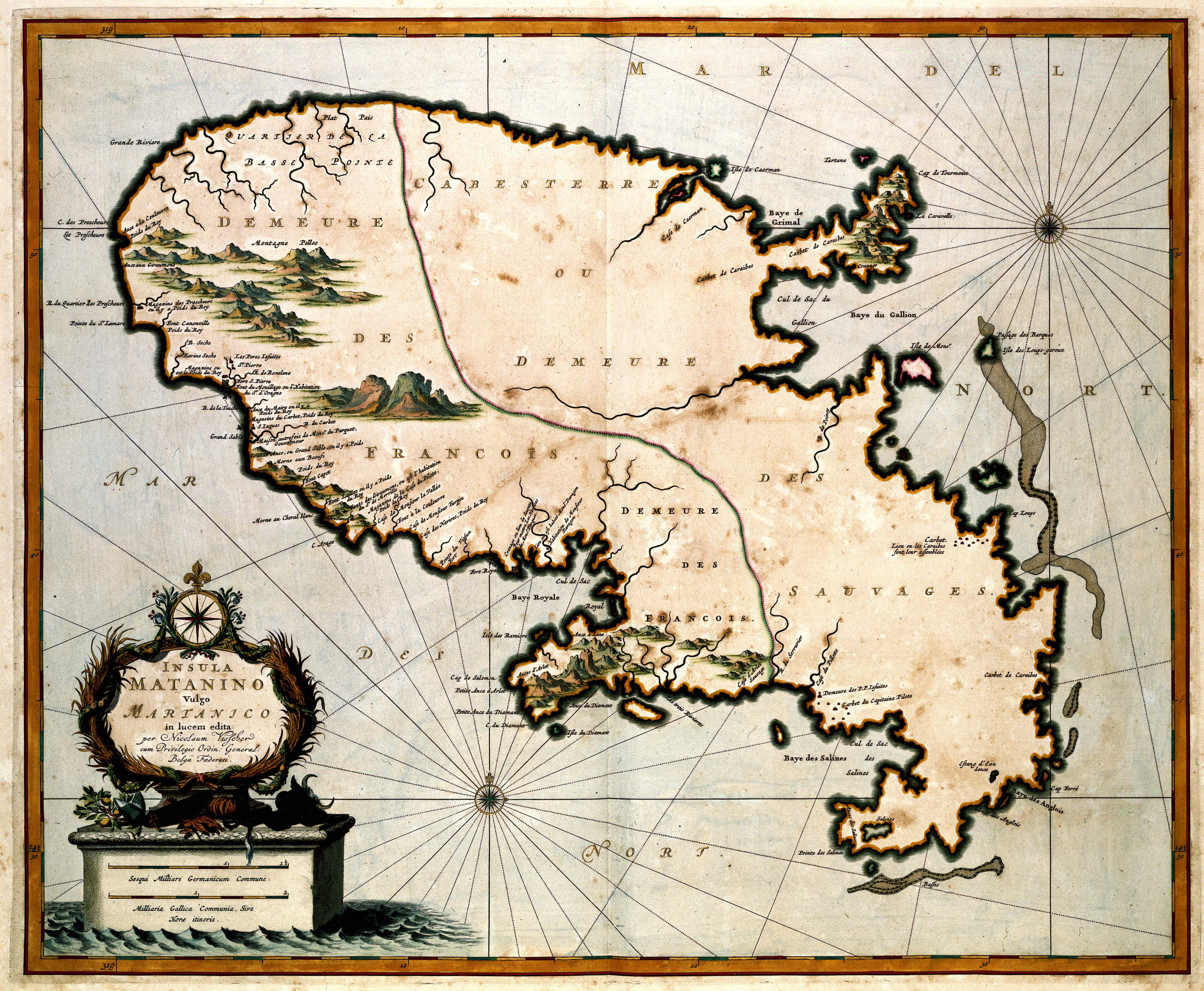 Deel: 4